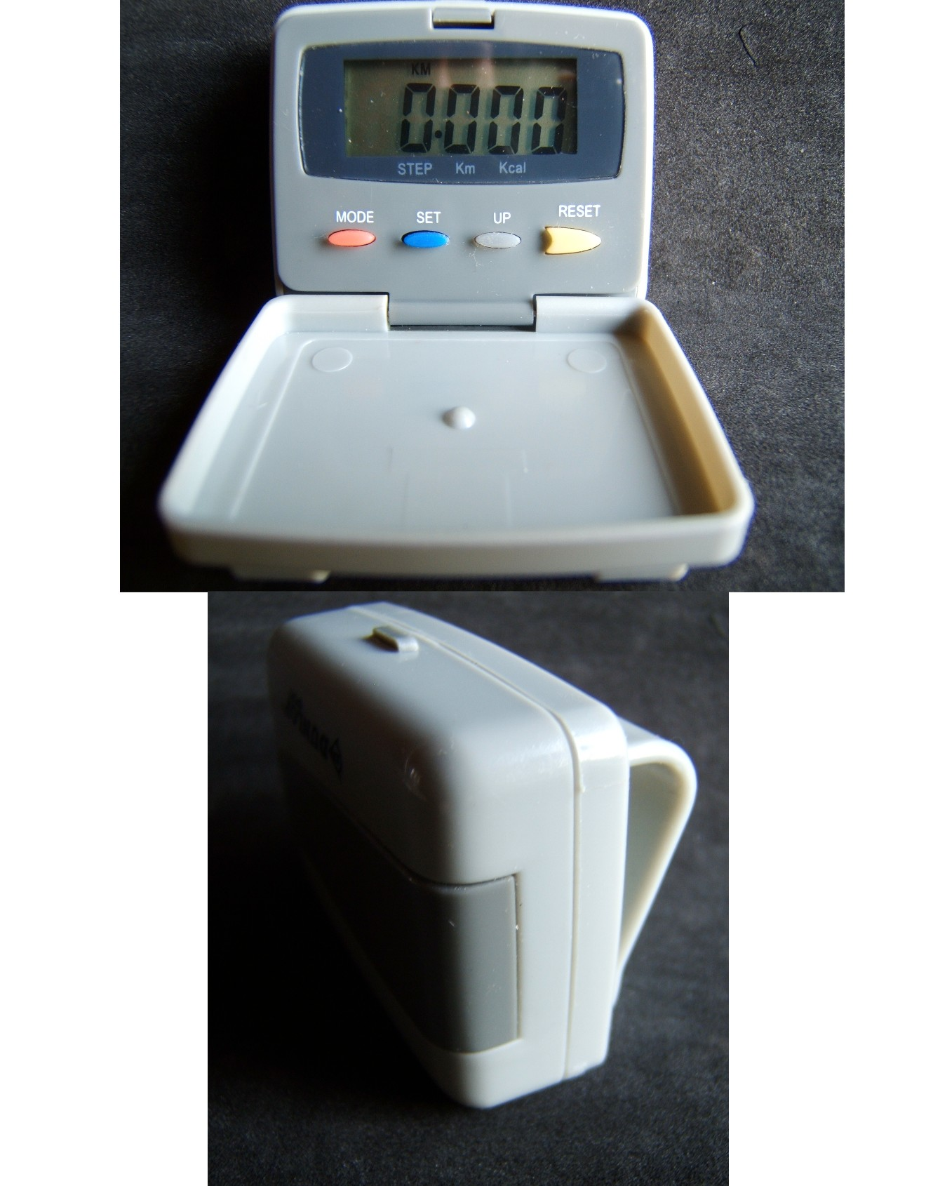 Stappenteller